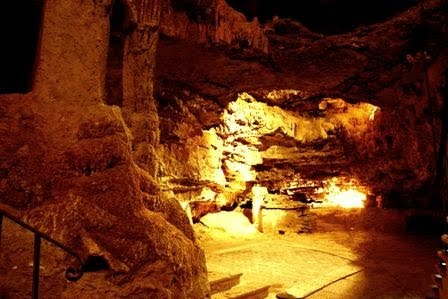 Altra visuale nella grotta di Sant'Oronzo.